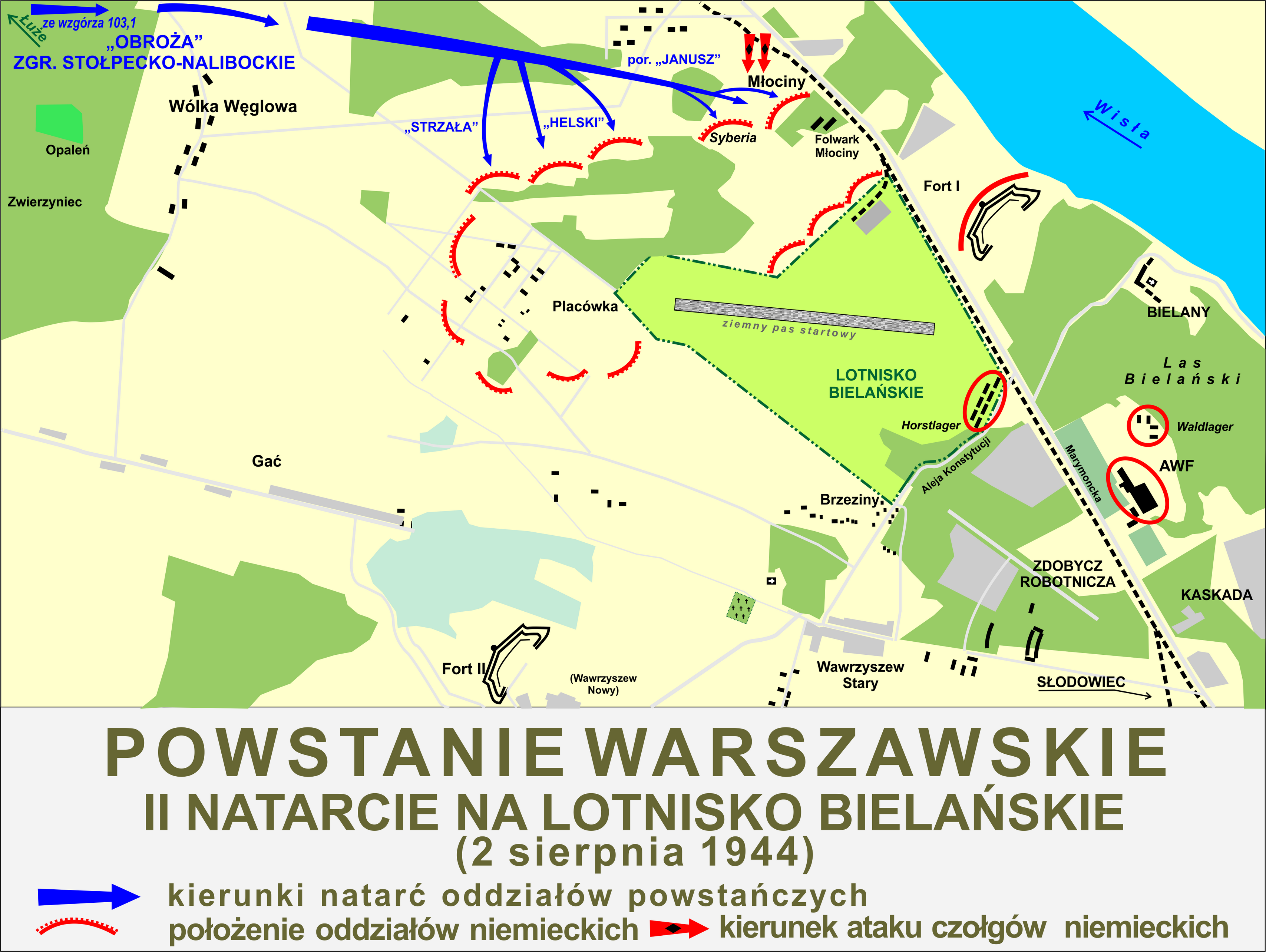 Powstanie Warszawskie 1944 - II Powstańcze natarcie na lotnisko bielańskie